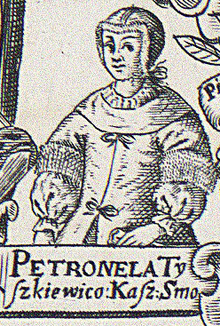 Беларуская (тарашкевіца): Партрэт Пэтранэлі Палубінскай (Petranela Pałubinskaja) з роду Тышкевічаў (Tyškievič)